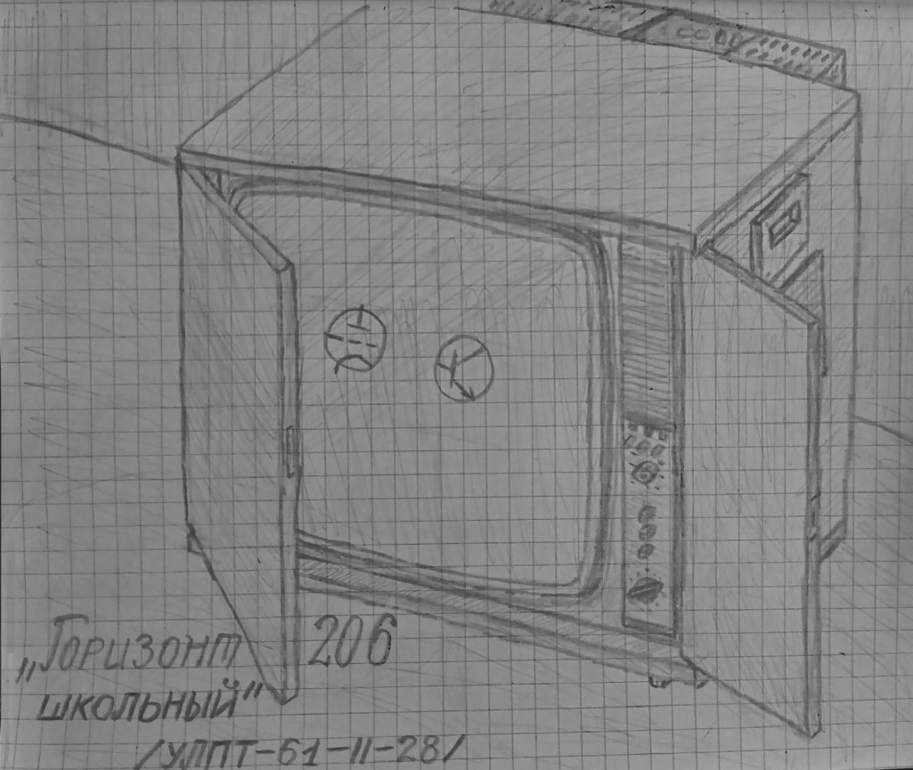 Телевизор «Горизонт-206-школьный».